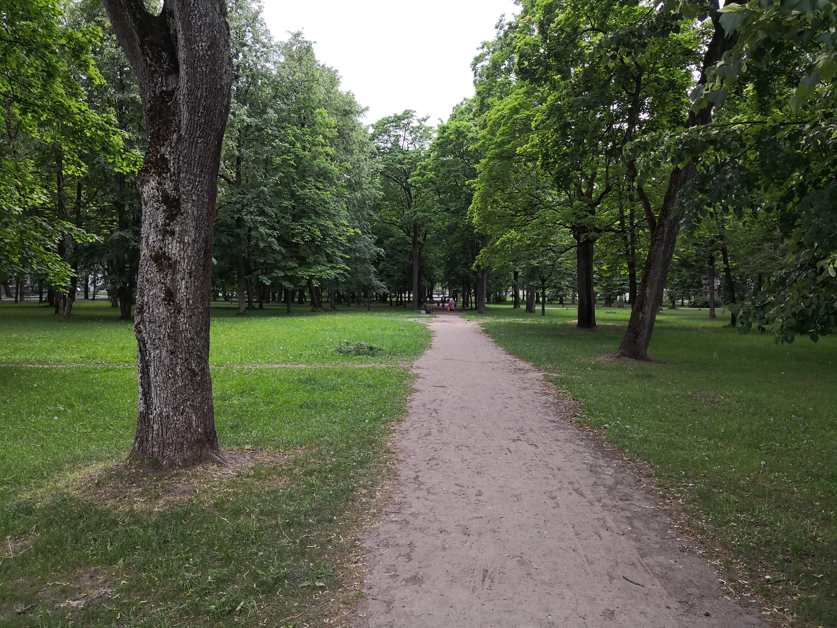 Sapiegų rūmų parkas 2018 m. gegužę, nuo Sapiegų rūmų pusės, žvelgiant iš rytų į vakarus. G. Kulikausko fotografija.